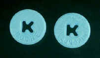 Clonazepam tablets Klonopin 1mg.